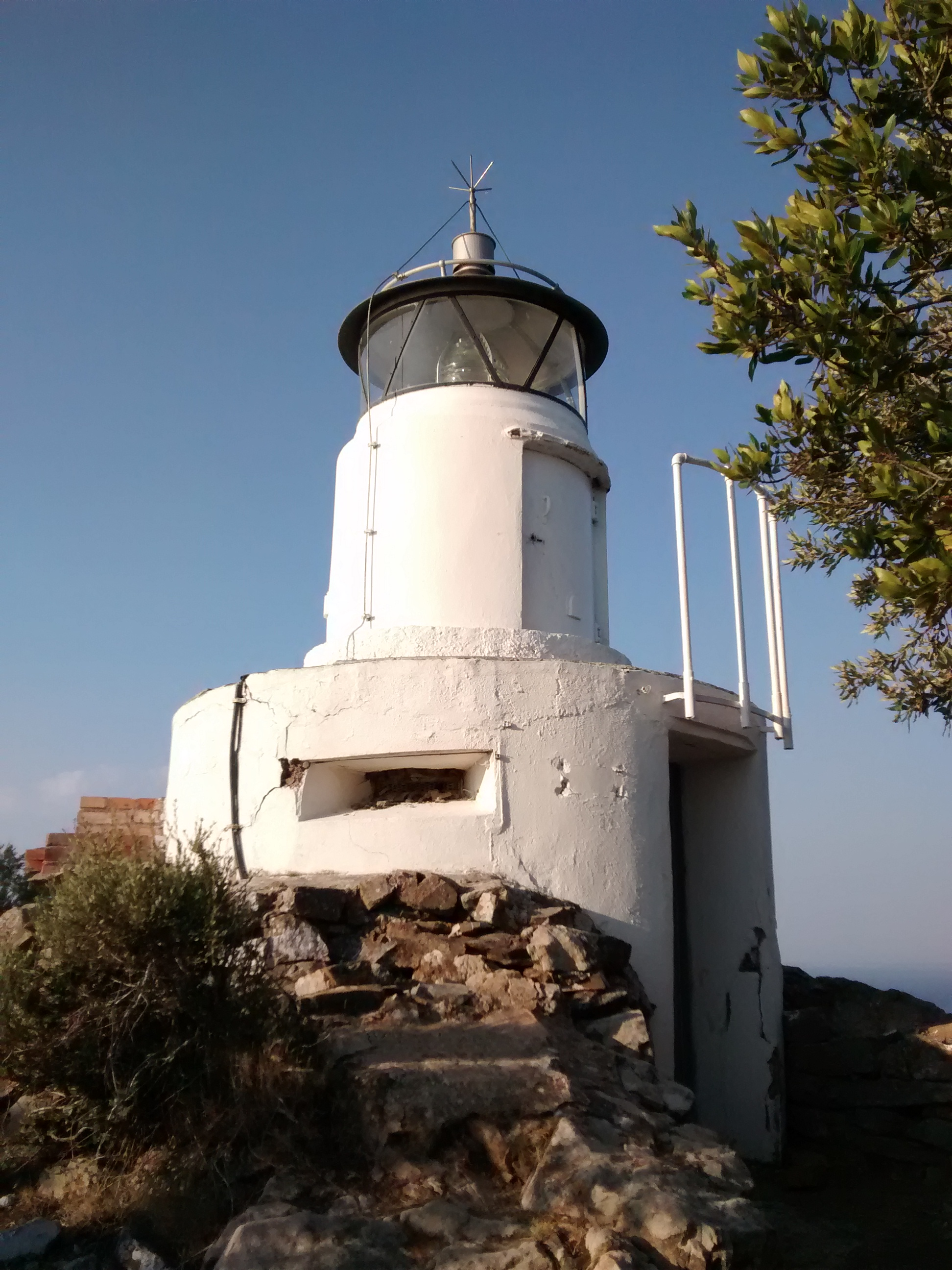 Faro di Capo Poro (punta Poro) a Marina di Campo, isola d'Elba.